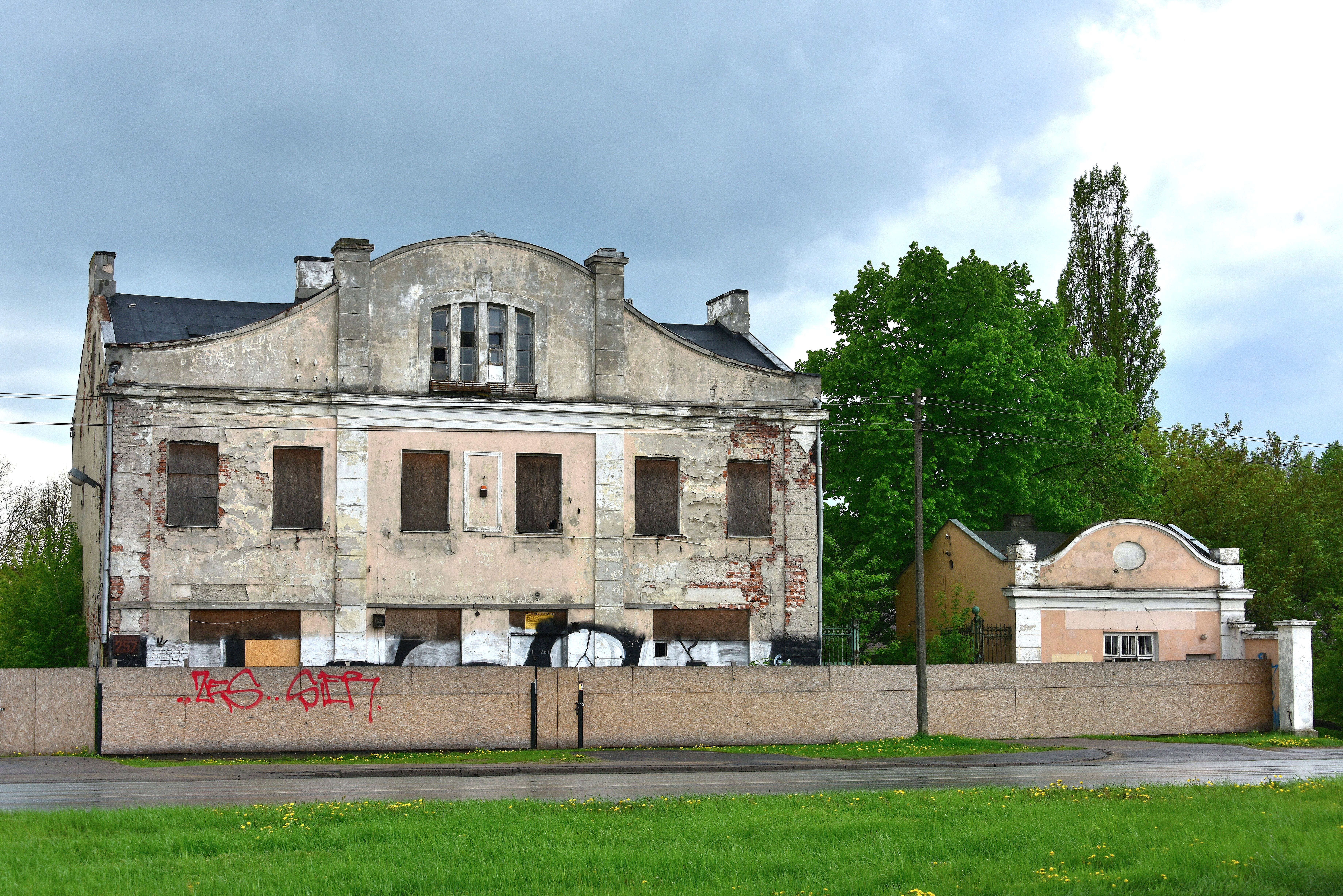 Budynek Zakładu dla Upadłych Dziewcząt (d. ośrodek "Przystań") przy ul. Modlińskiej 257 w Warszawie